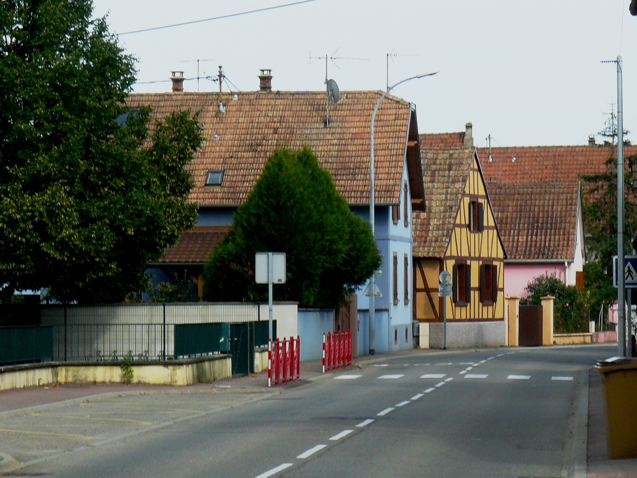 La rue principale du village